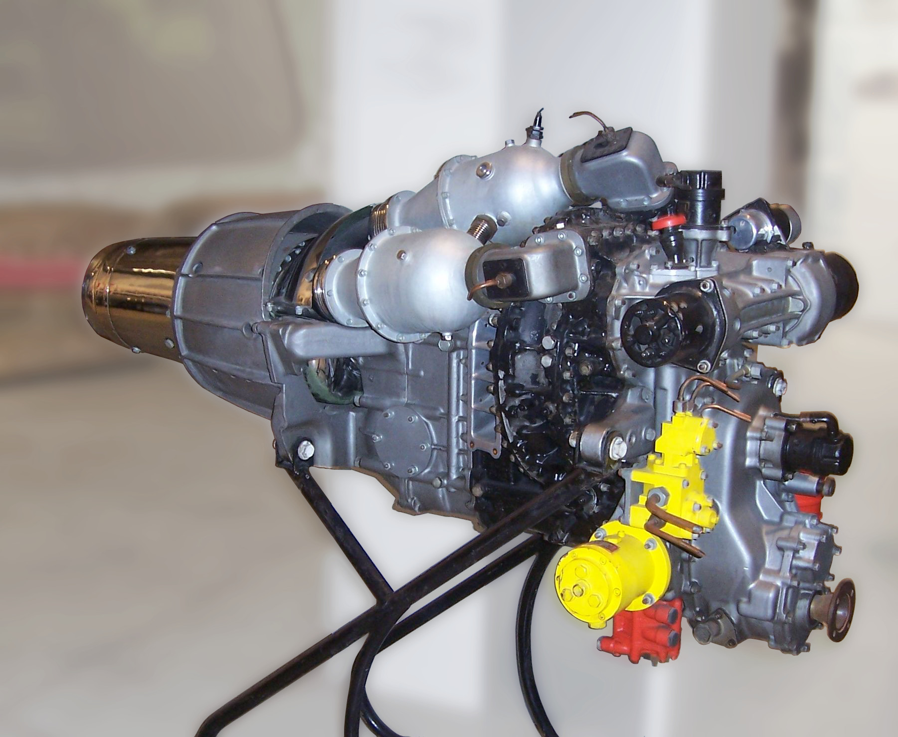 Gasturbine "Tipo 8001" der Fiat Turbina